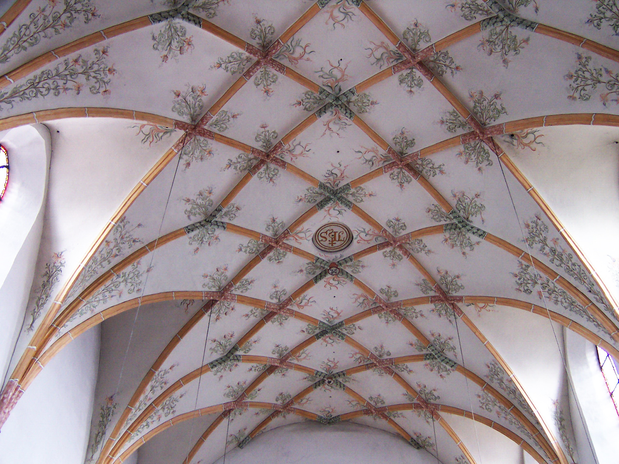 Essenbach, Altheim, Dorfstraße 80. Katholische Kirche St. Peter. Saalkirche, spätgotische Anlage um 1456. Sternförmig figuriertes Rippengewölbe.